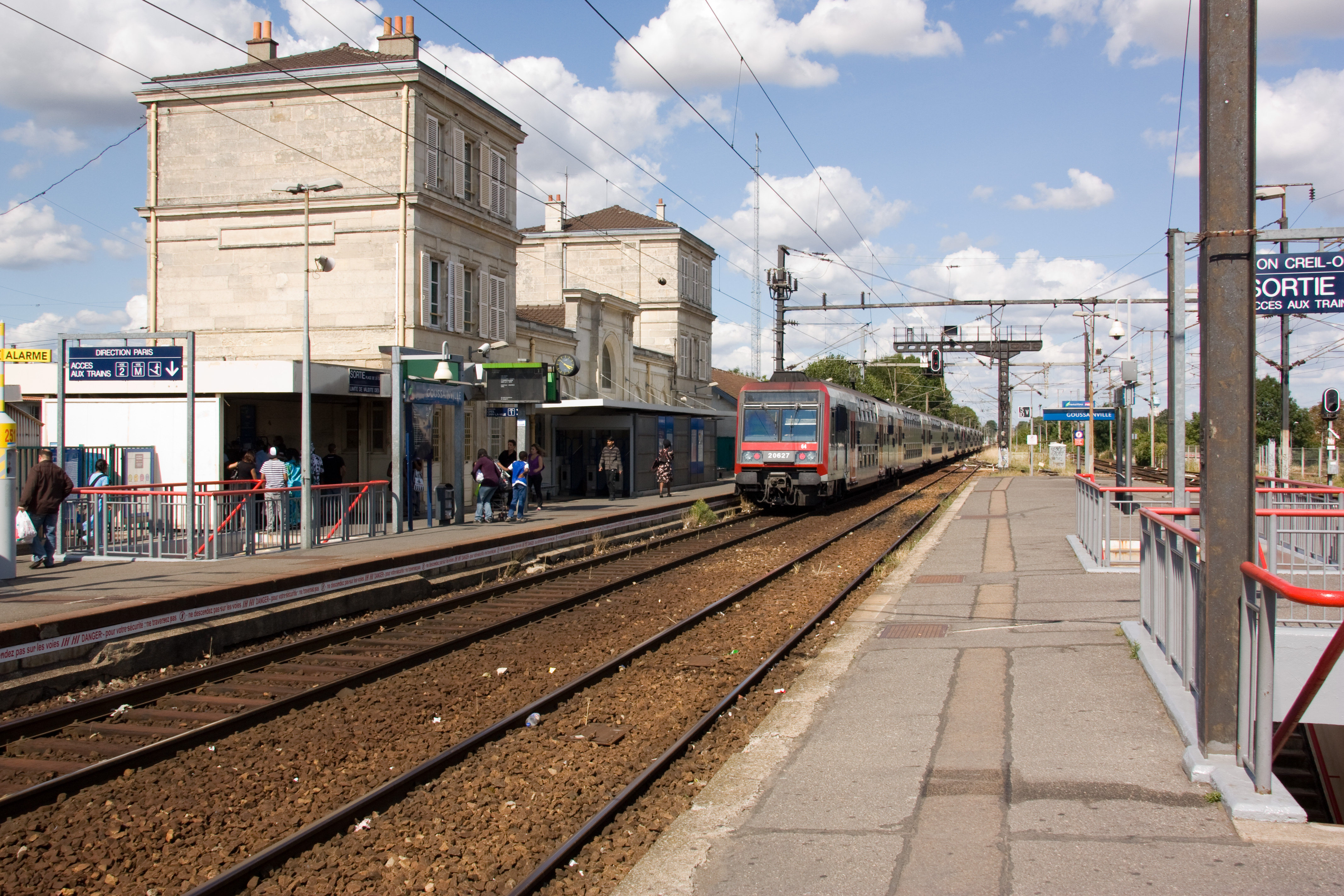 La Gare de Goussainville, département du Val-d'Oise, France